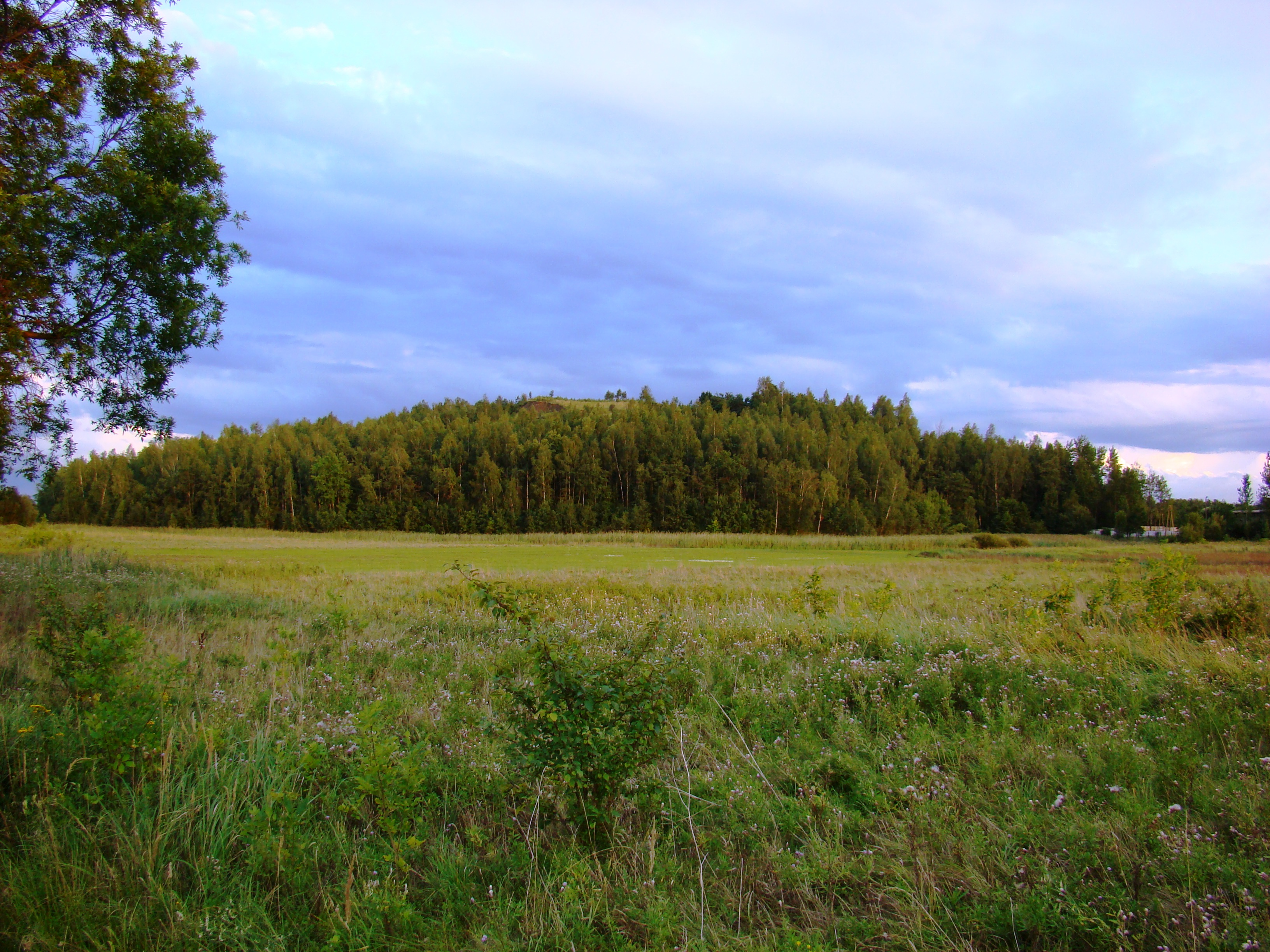 hałda kopalni rud żelaza "Szczekaczka" w Kolonii Brzezinach, 299 m n.p.m.